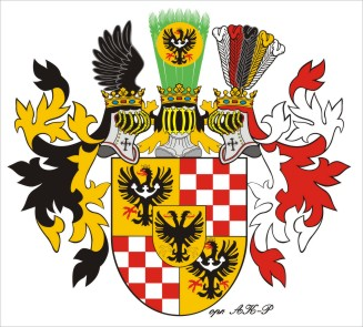 Herb hrabiego legnickiego (opr. AK-P). Jestem autorem tej grafiki (moje godło zgodnie ze zwyczajem zamieściłem na grafice). Zgadzam się na jej wykorzystanie w wikipedii, bo też i sam ją tam osobiście umieściłem, jako ilustrację do artykułu, którego pierwszą wersję popełniłem. Pozdrawiam --AK-P 17:38, 29 wrz 2005 (CEST)